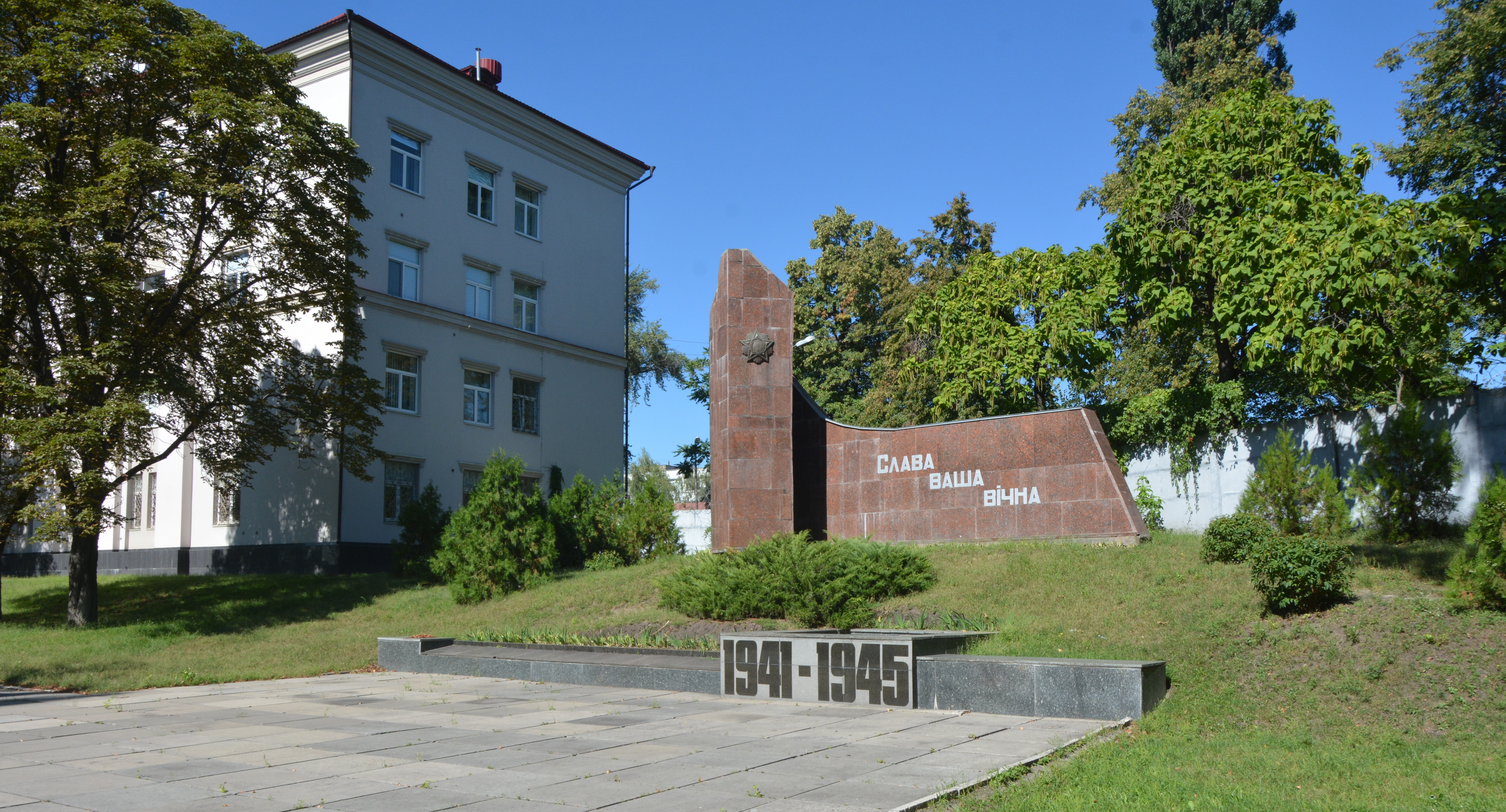 Пам’ятник працівникам вагонобудівного заводу, що загинули на фронтах Великої Вітчизняної війни, Кременчук, Вагонобудівний завод, сквер